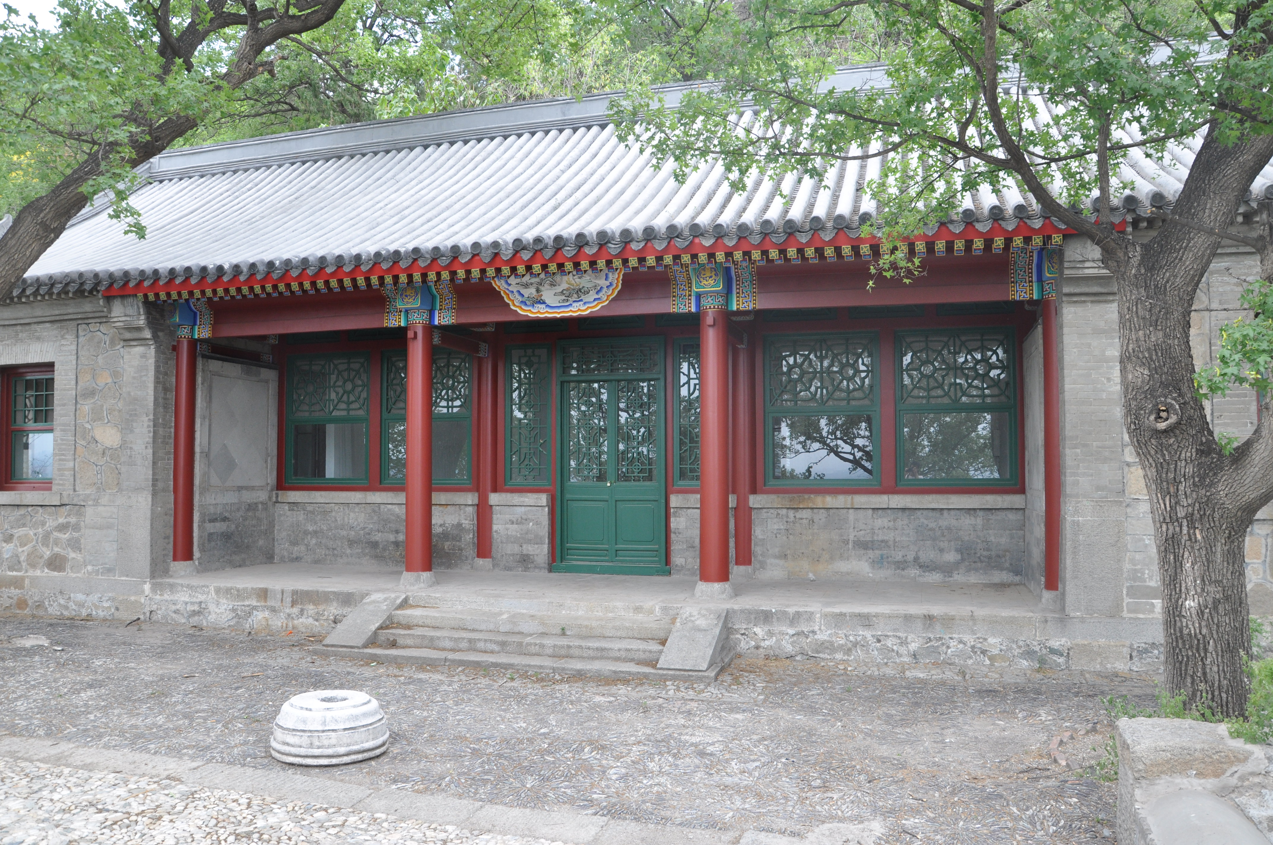 贝家花园南房的正面。